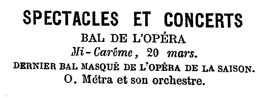 Annonce du dernier bal de l'Opéra de la saison du Carnaval de Paris 1878-1879, sous la direction d'Olivier Métra. Le Tintamarre, 9 mars 1879, page 8, 3ème colonne.